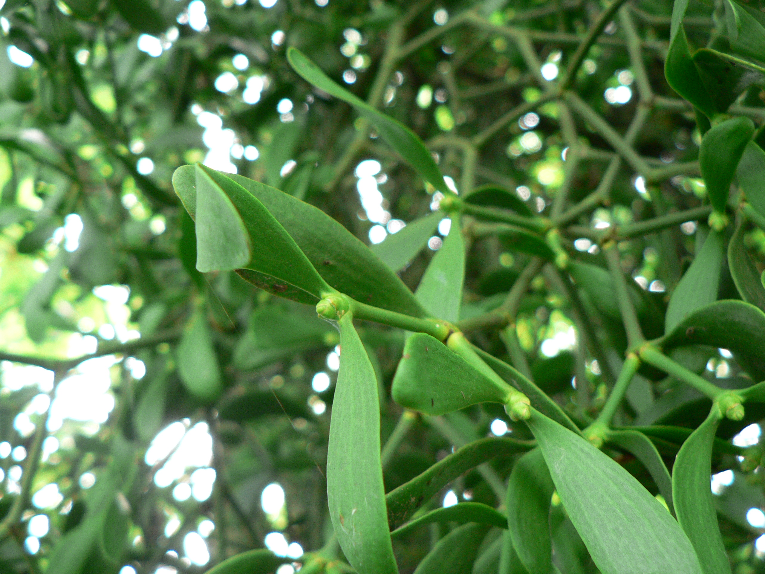 mistletoe in sorbus